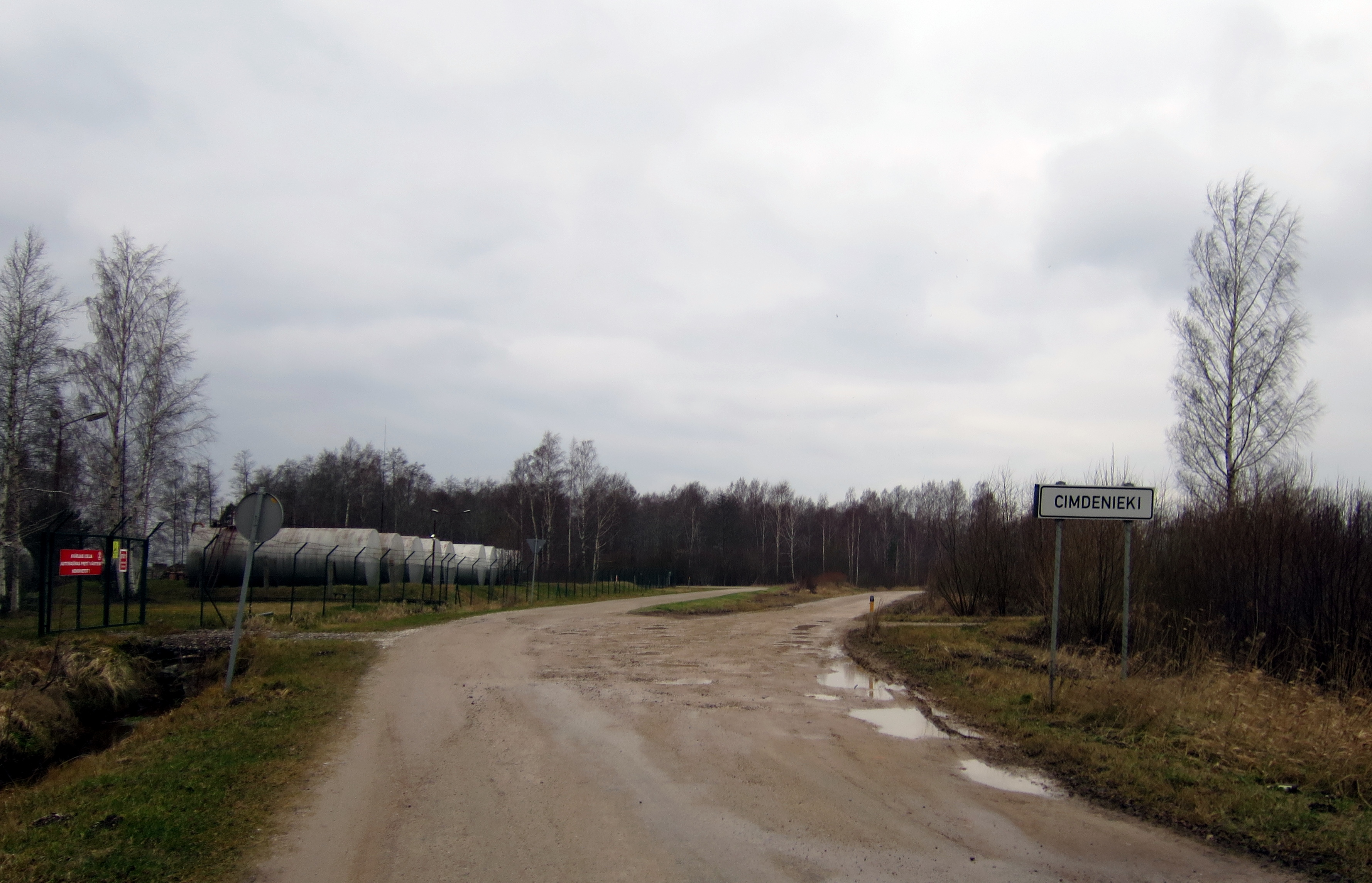 Ceļš uz Cimdeniekiem no Grobiņas puses (V1222). Pa kreisi Lidostas iela, pa labi — Sporta iela.